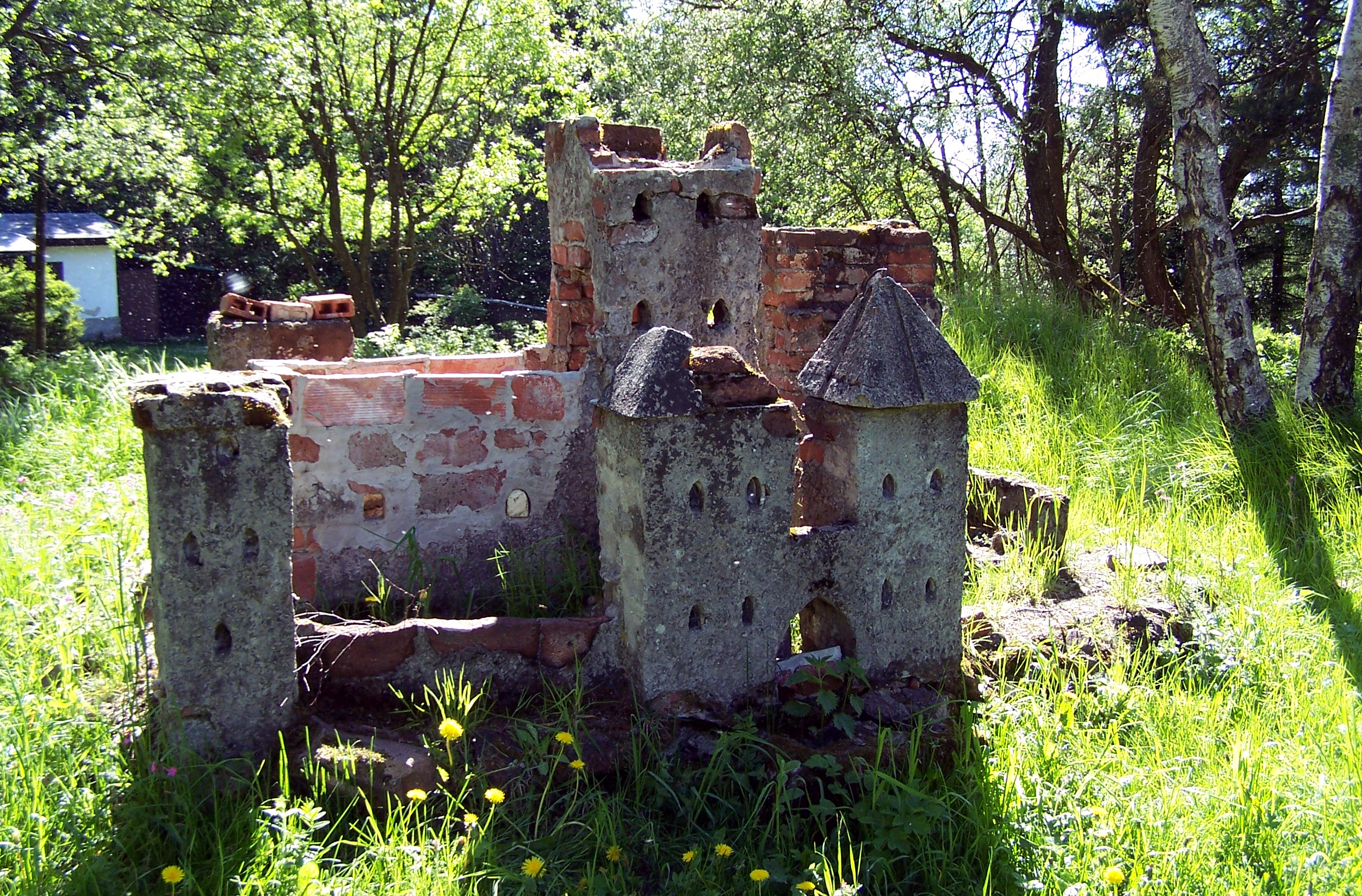 Bývalý pracovní tábor Rovnost – tzv. Palečkův hrad.